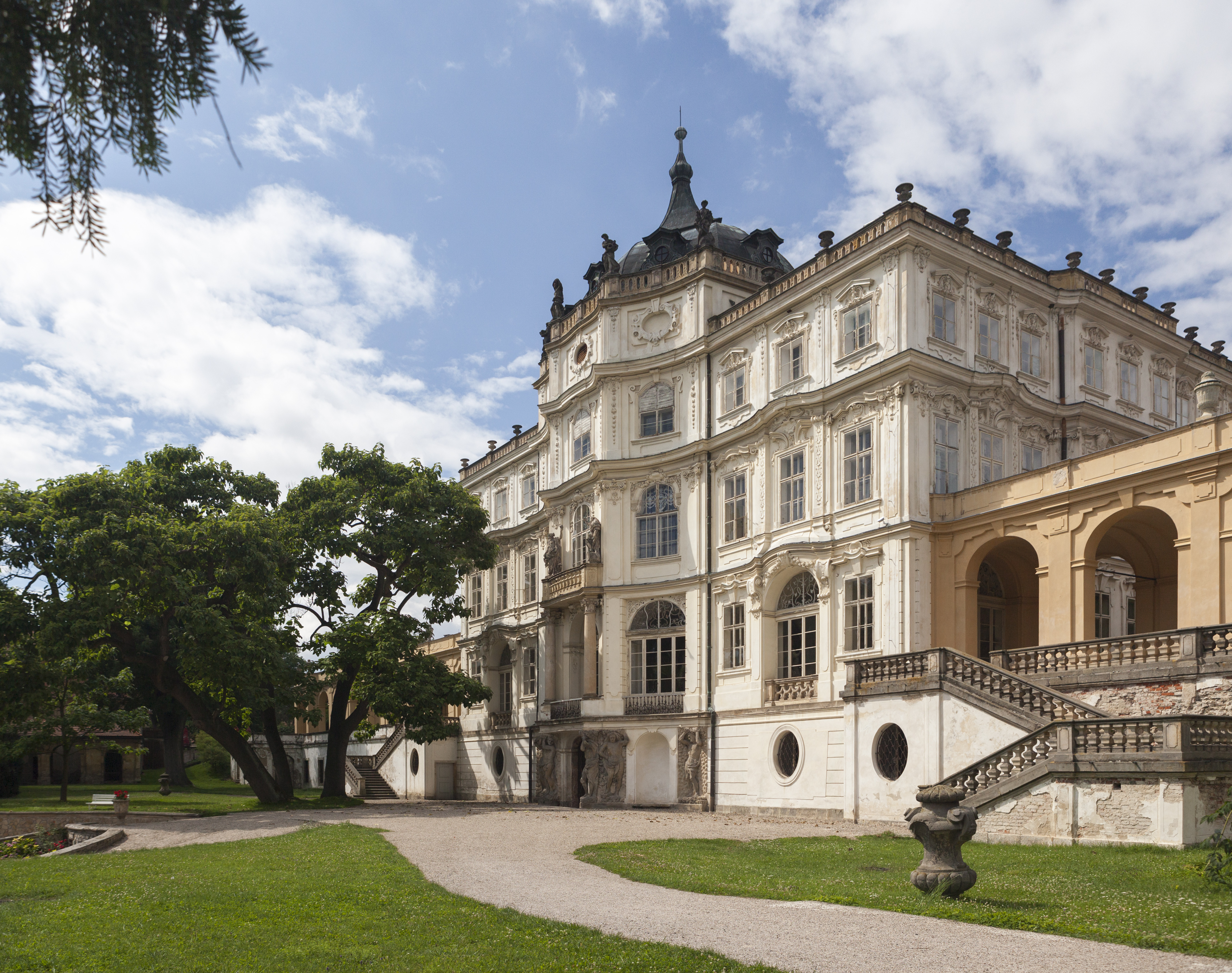 Zámek Ploskovice, Ploskovice 1, Ploskovice.